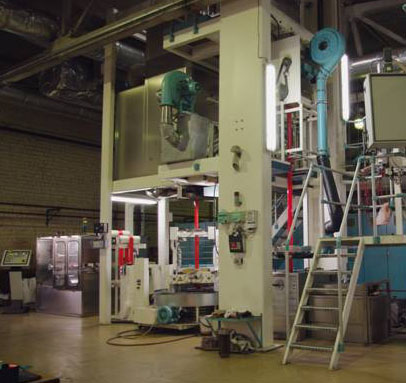 Экструзионный учаток производства полиамидной оболочки Биолон.